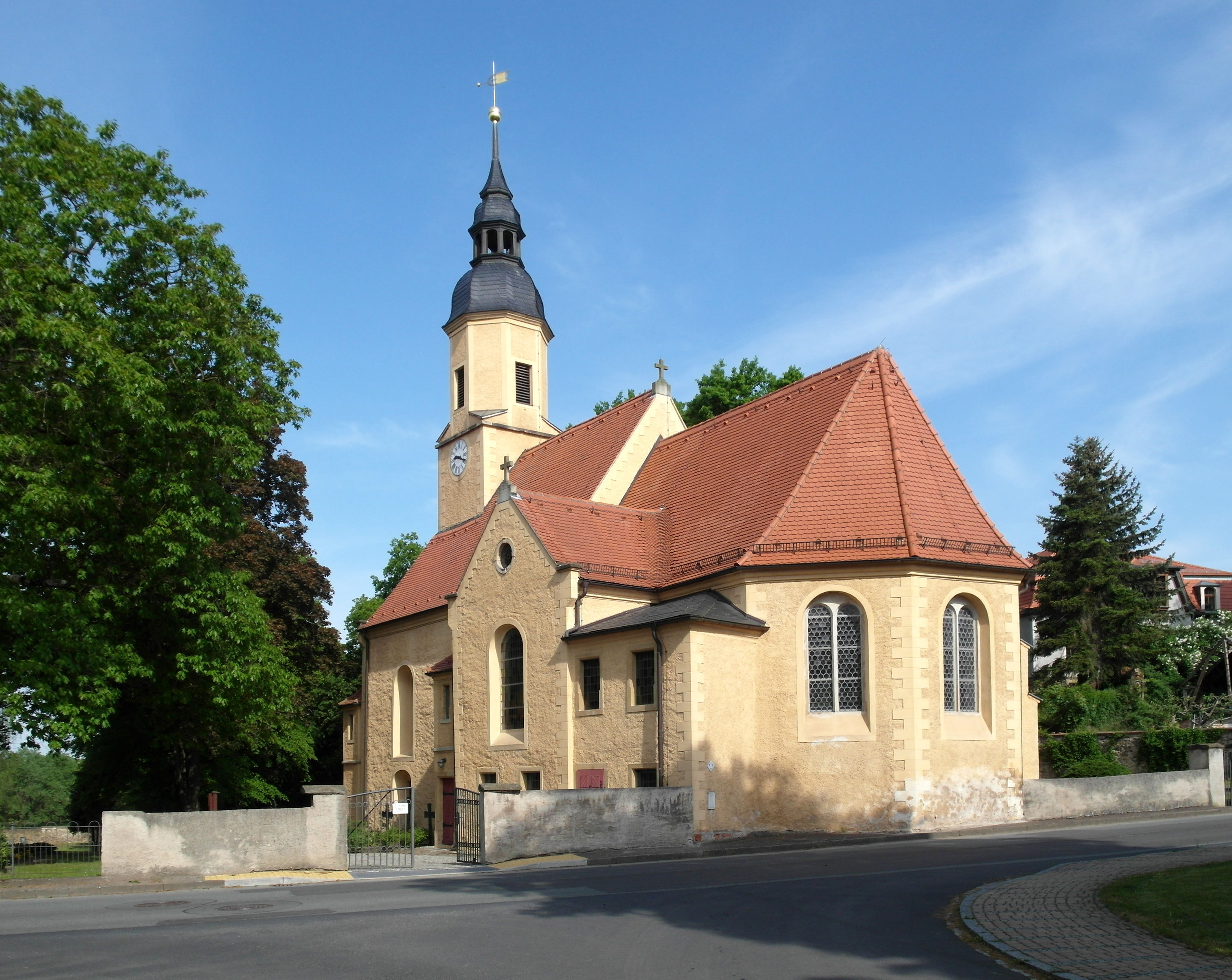 19.05.2016 01612 Glaubitz: Kirche (GMP: 51.316957,13.382074) von SO. Kirchgasse. 1319 wird erstmals eine Kirche erwähnt. Die heutige Kirche entstand nach der Reformation in der Zeit von 1586 bis 1589 - damals noch ohne Turm. Der Turm entstand im Jahr 1741. [SAM6032.JPG]20160519300DR.JPG(c)Blobelt